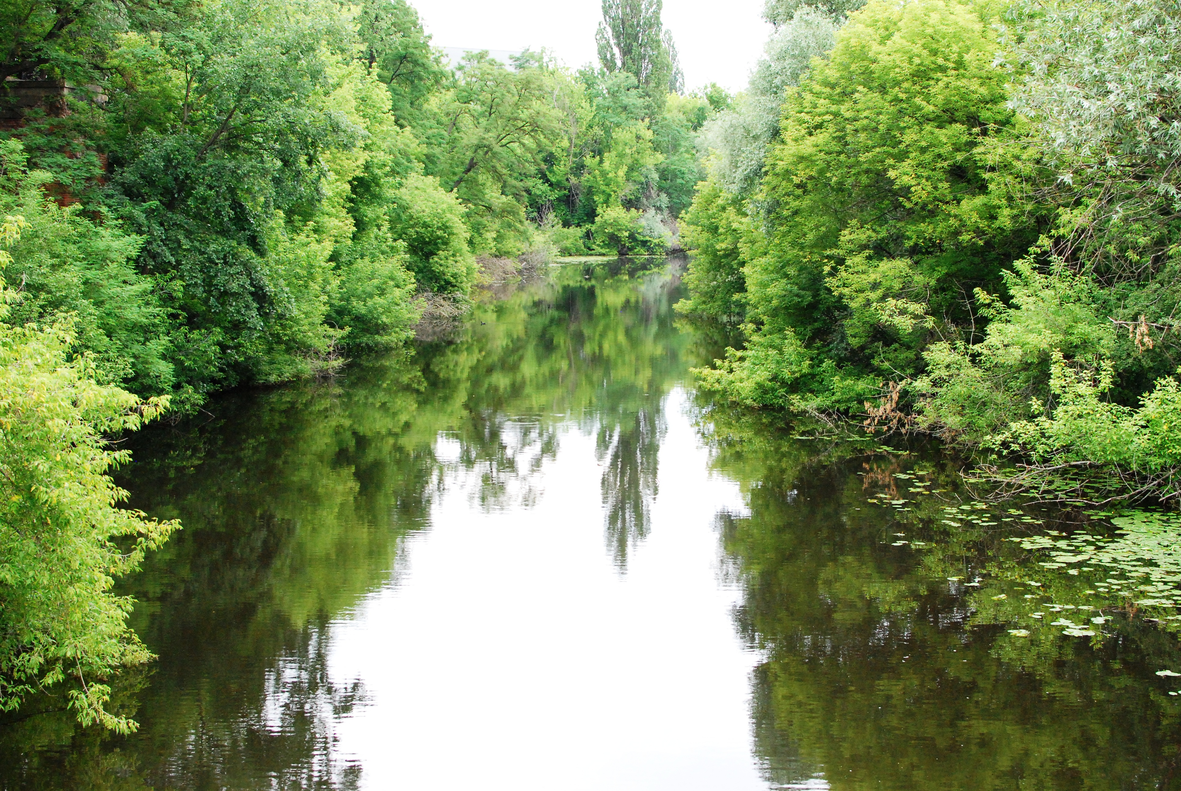 Zehlendorfer Stichkanal an der Fußgängerbrücke des Teltowkanal-Uferwegs in Zehlendorf, Berlin, Deutschland.